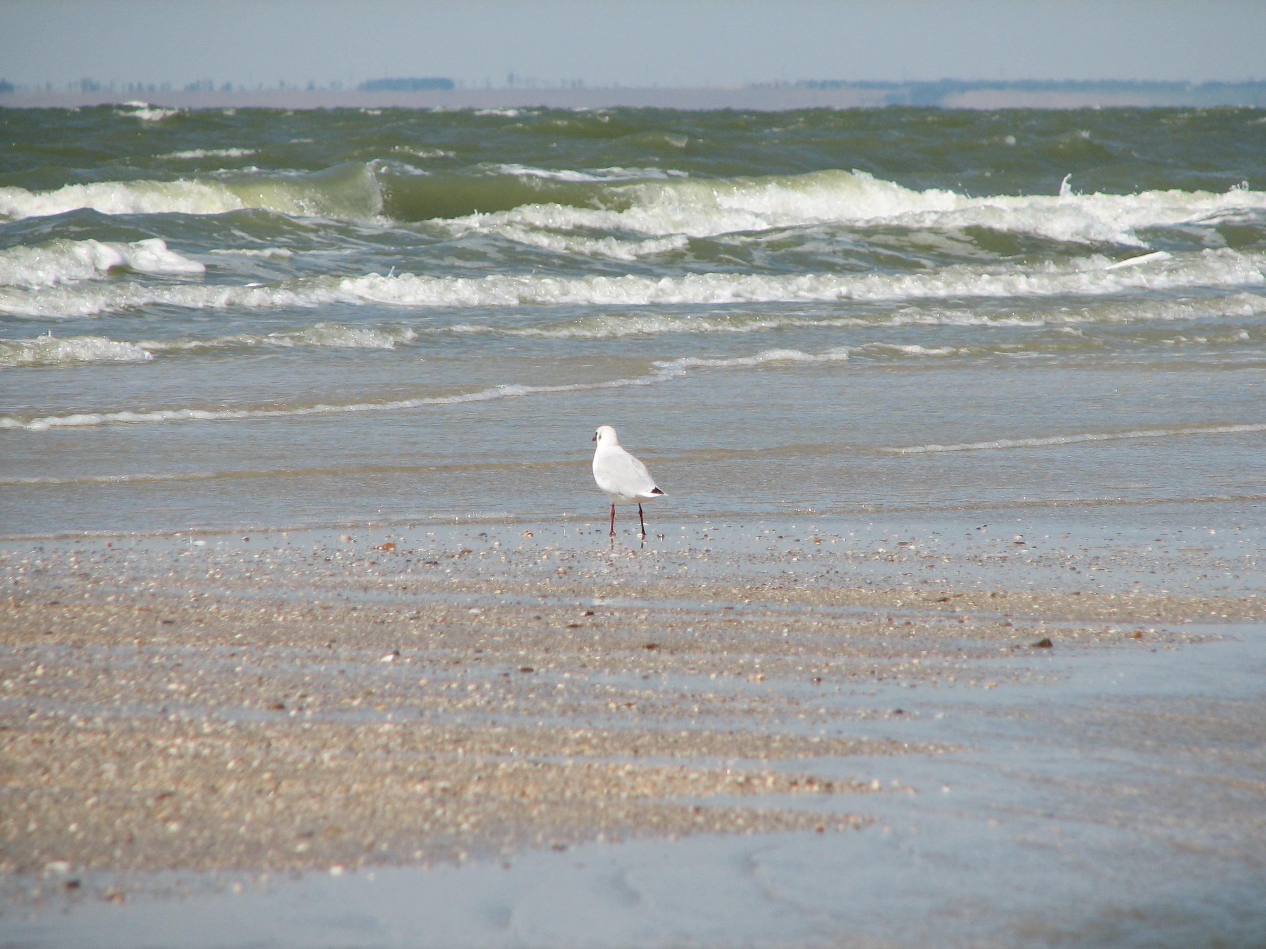 Снимок сделан на Бердянской косе